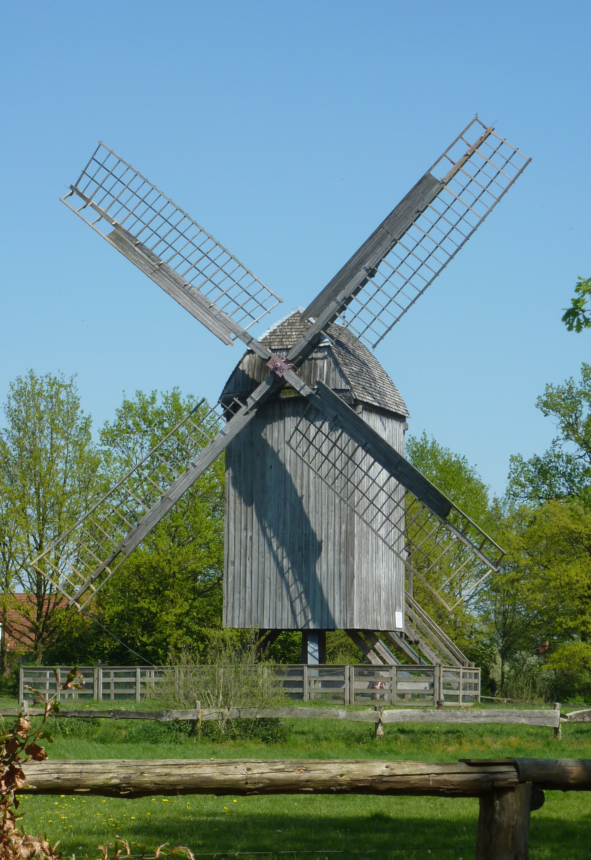 Museumsdorf Cloppenburg